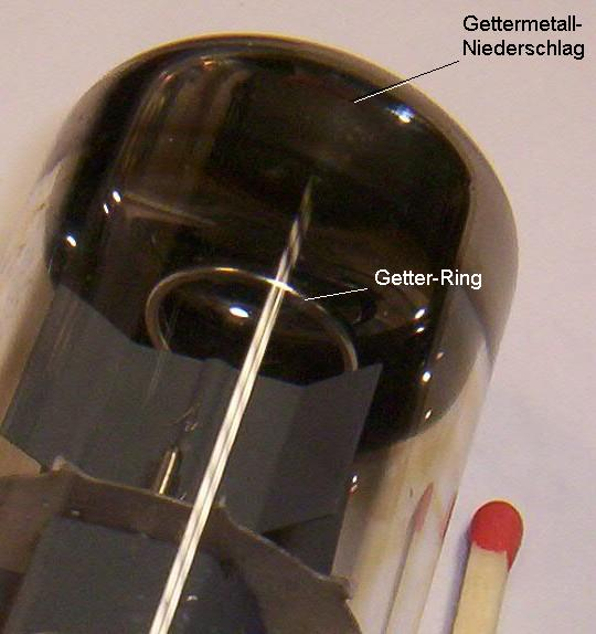 Getter-Ring und Getter in einer Elektronenröhre